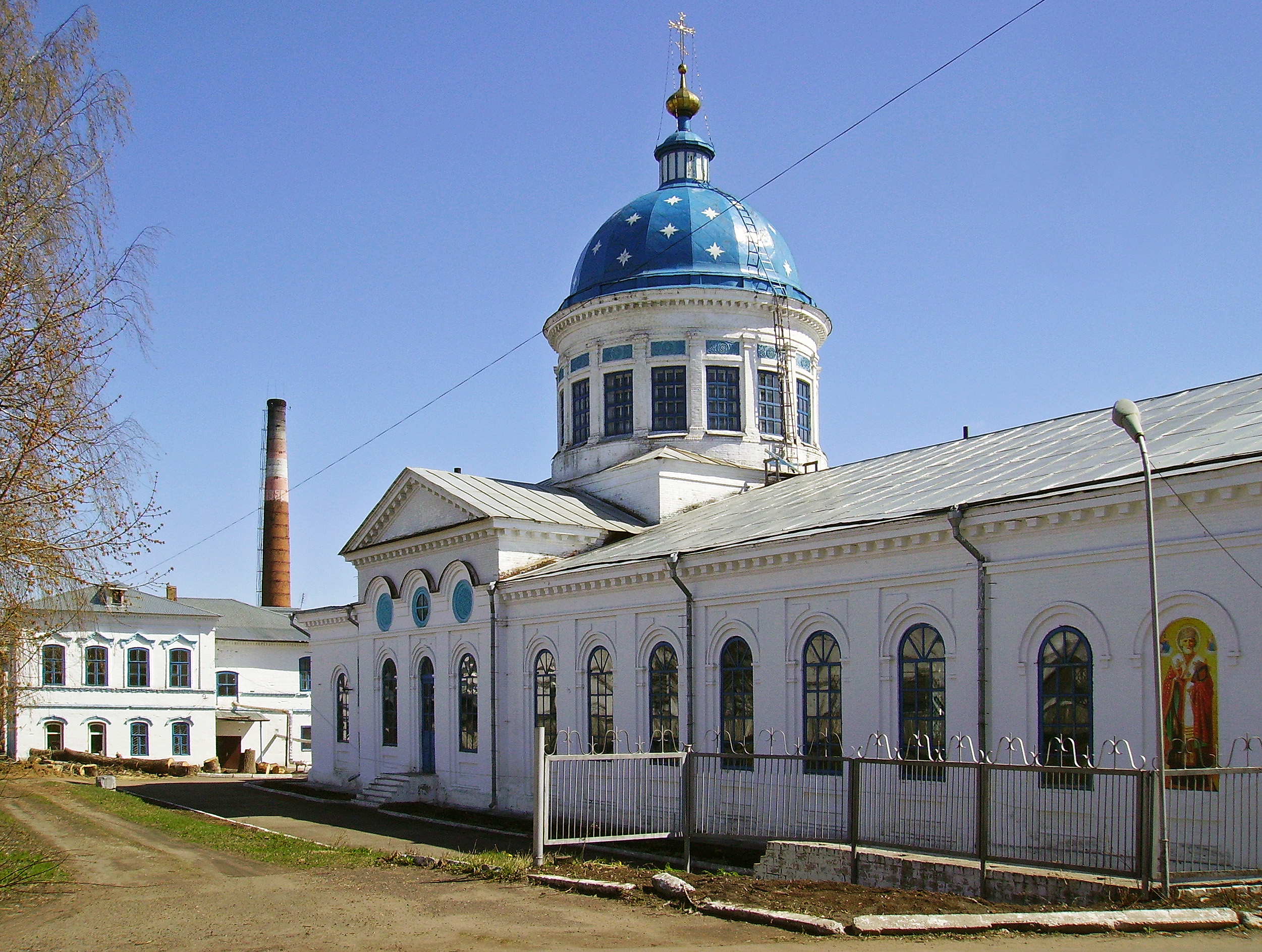 Котельнич. Церковь Николая Чудотворца